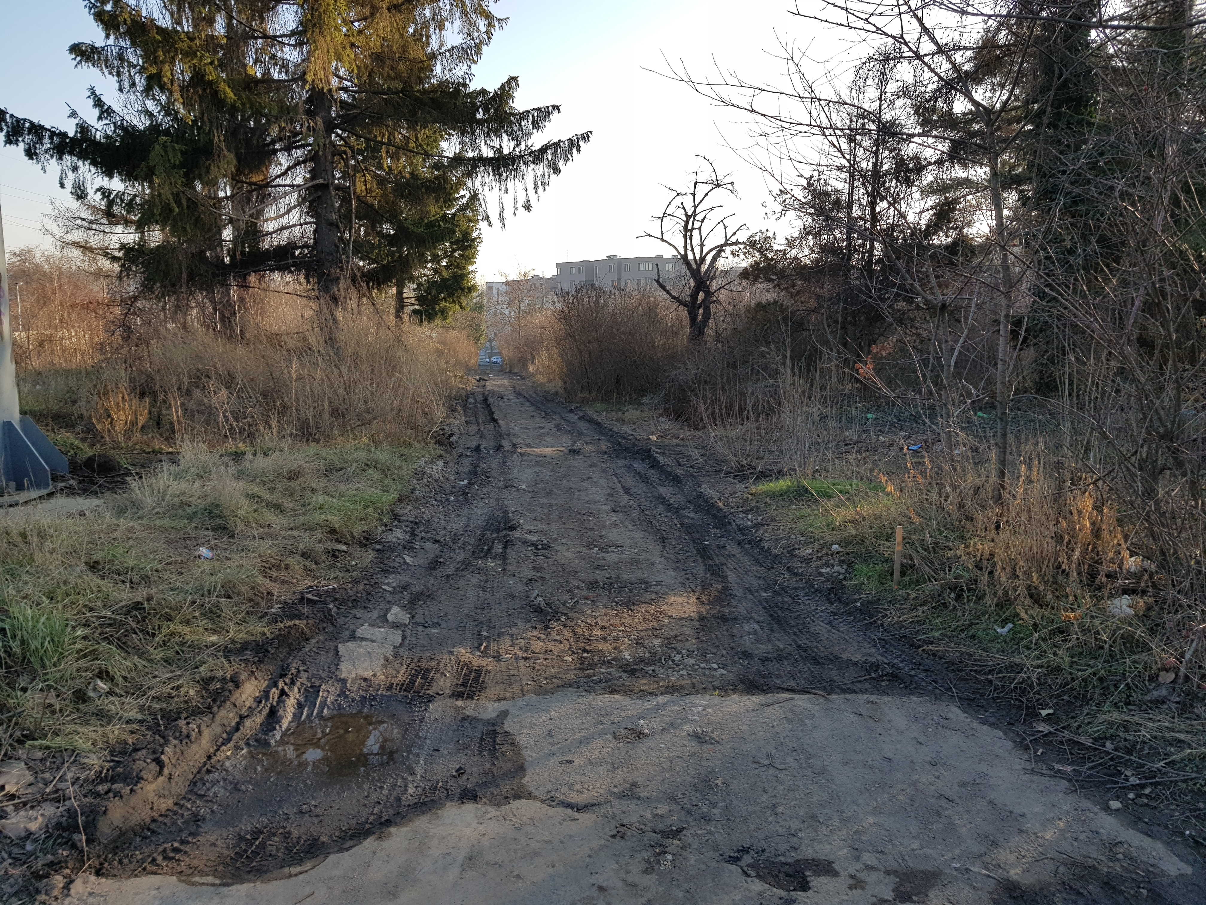 Parcela v Praze 9-Hloubětíně, kde se bude stavět projekt Lappi Hloubětín. Cesta od Kolbenovy směrem na jih.